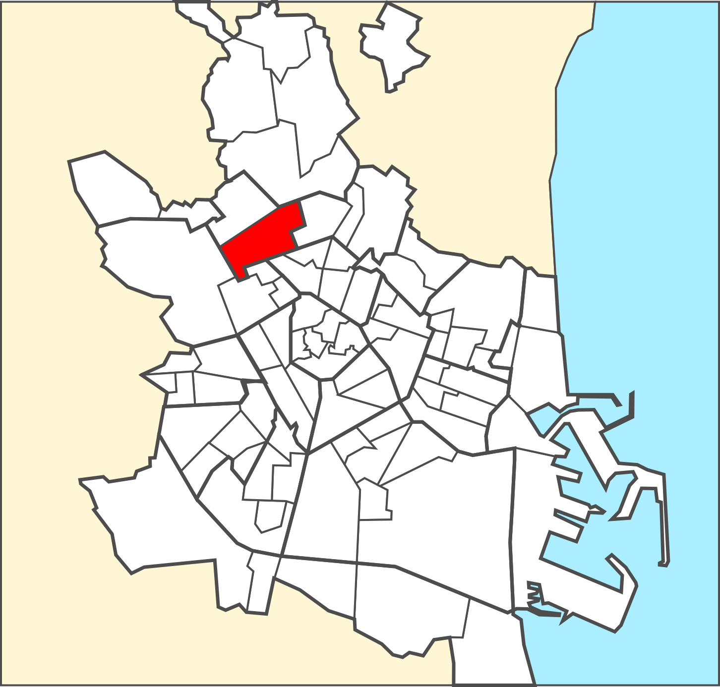 Localització del barri dins de la ciutat de València.